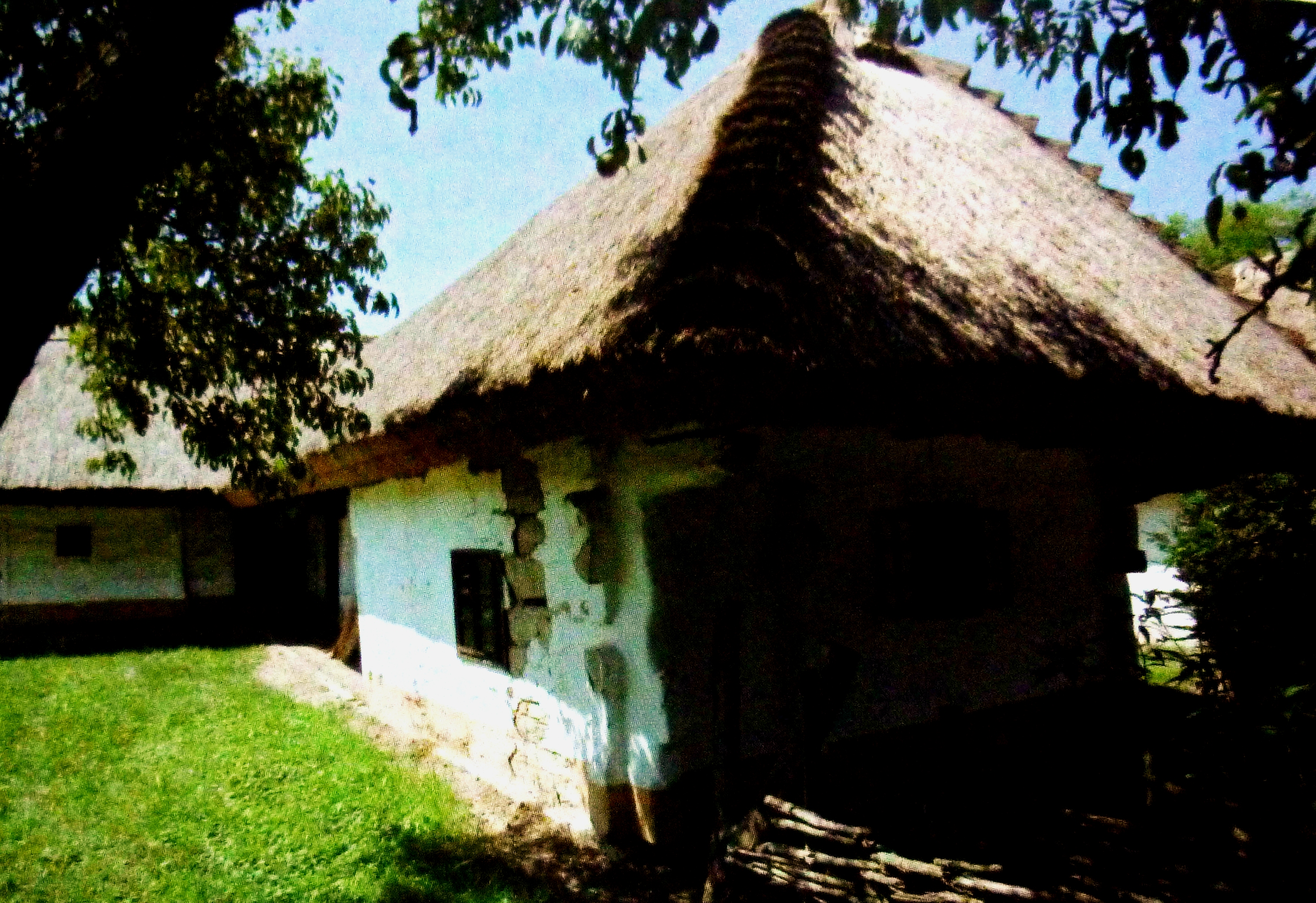 Göcseji Falumúzeum: zalalövői hajlított ház